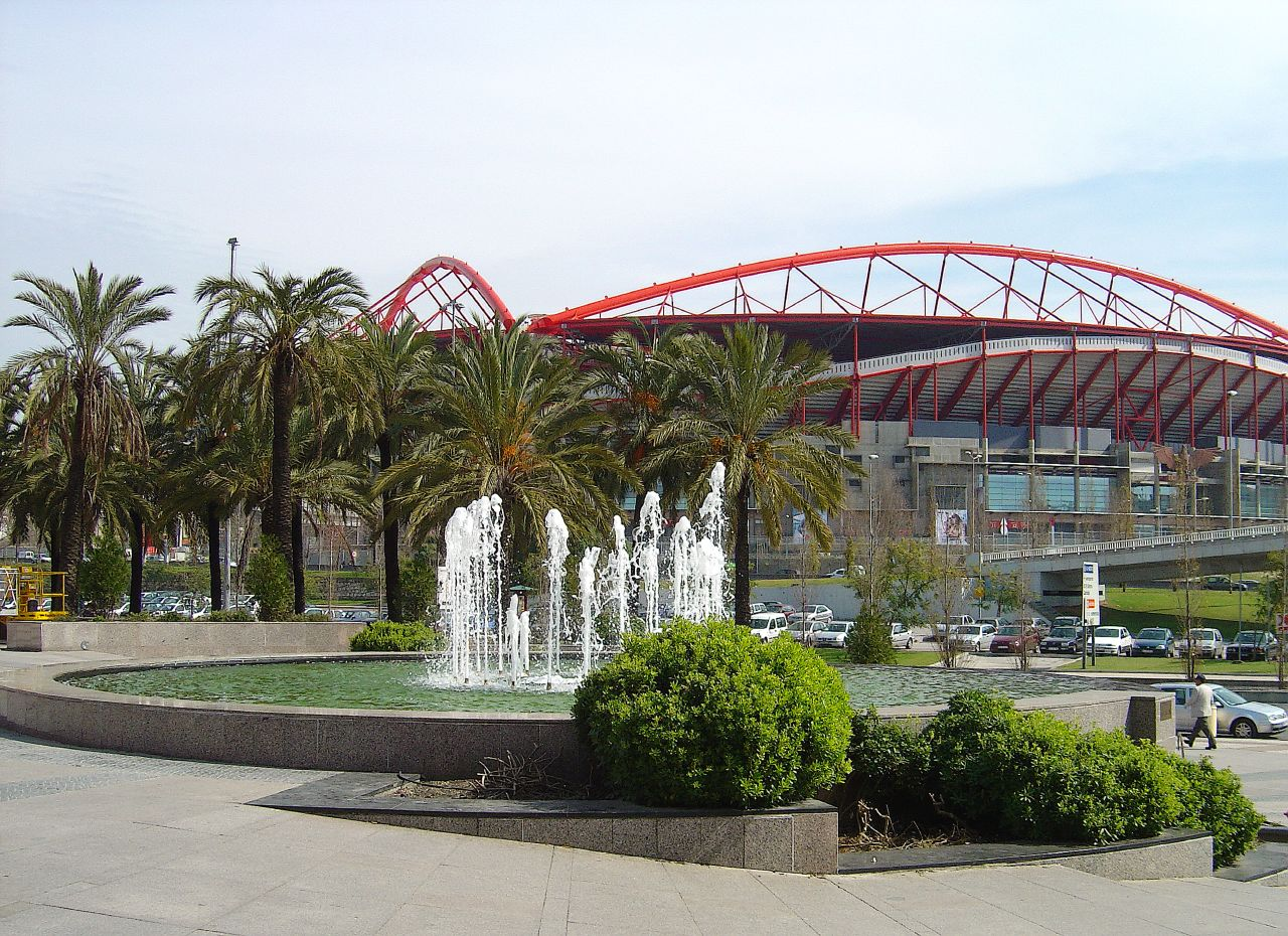 Estádio visto a partir do Centro Comercial Colombo.